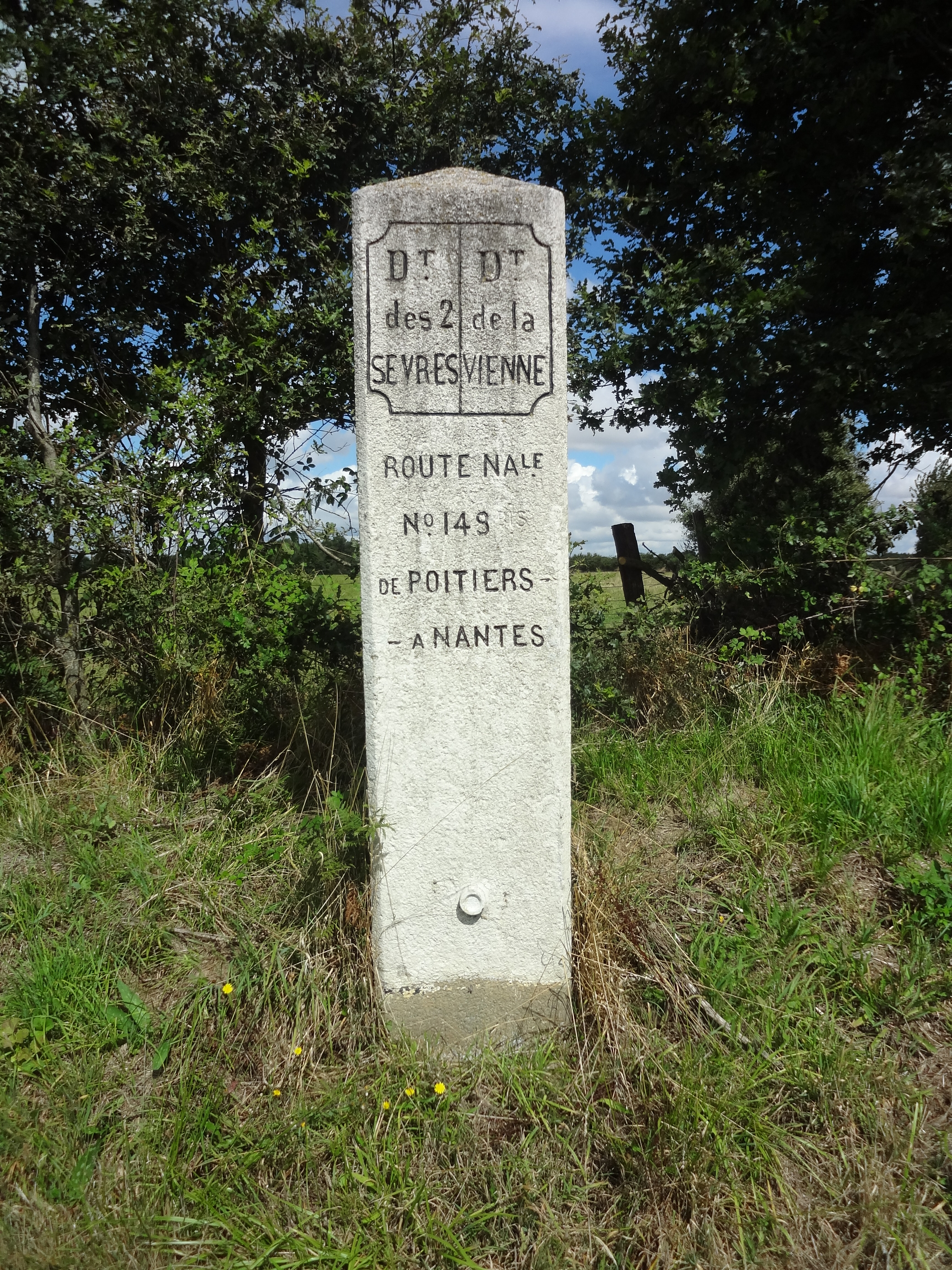 Borne située le long de la route nationale 149, France, à la frontière des départements des Deux-Sèvres et de la Vienne. Sur la face avant (sud), elle porte (photo) : une inscription aux caractères encrés : (dans un cadre) D[épartemen]t des 2 Sèvres/D[épartemen]t de la Vienne Route nationale 149 (orignellement, 148 bis avec des parties non encrées quand la route a été renumérotée 149) de Poitiers à Nantes un médaillon du nivellement général portant l'altitude 169m15. Sur la face ouest : Parthenay 17 km Nantes 136 km Sur la face est : Ayron 8 kil Poitiers 33 kil